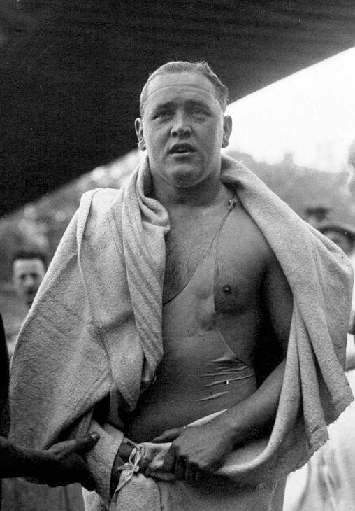 Traversée de Paris à la nage : Vandeplancke : [photographie de presse] / Agence Meurisse